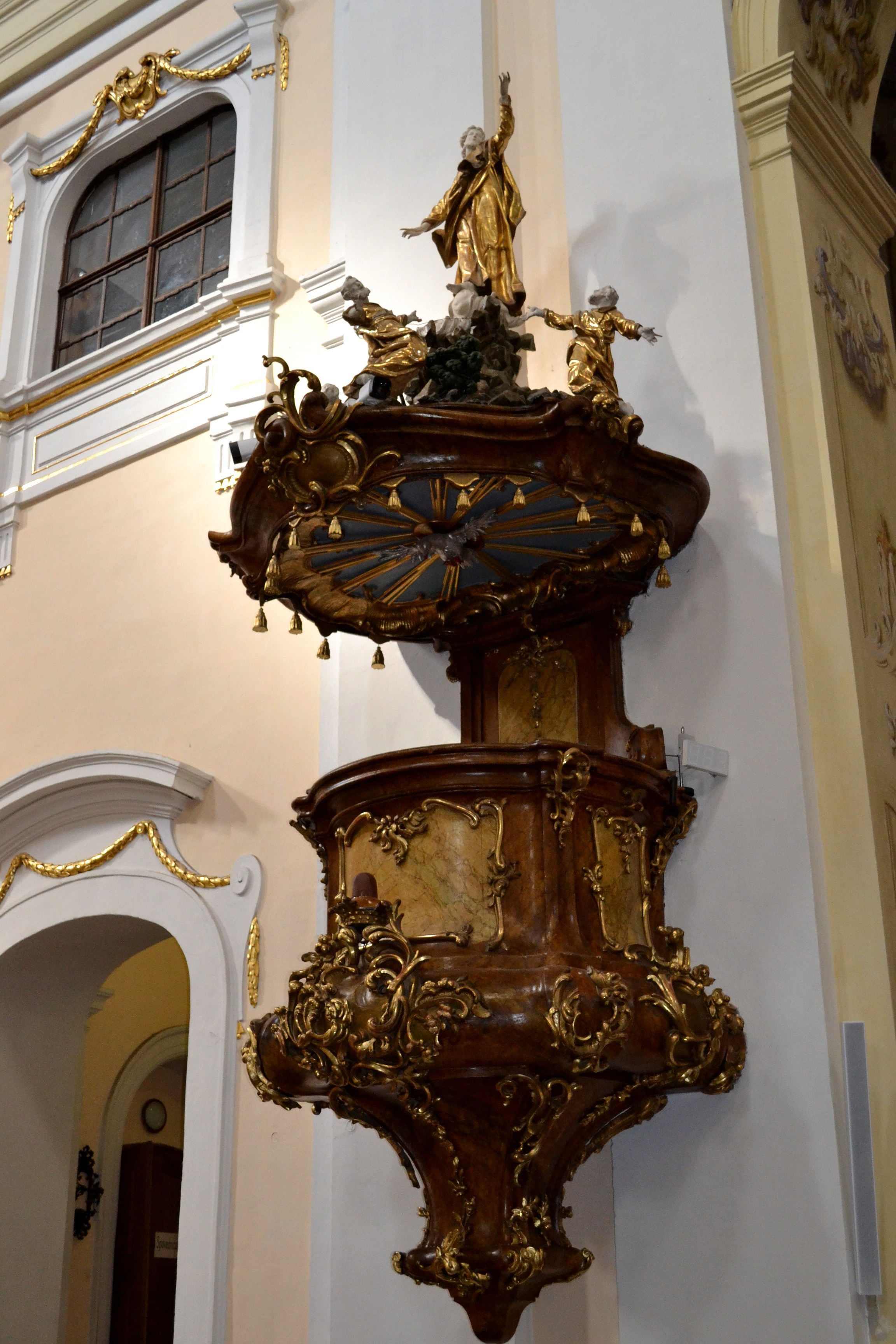 Šaštín-Stráže (okr. Senica), Bazilika Sedembolestnej Panny Márie; kazateľnica